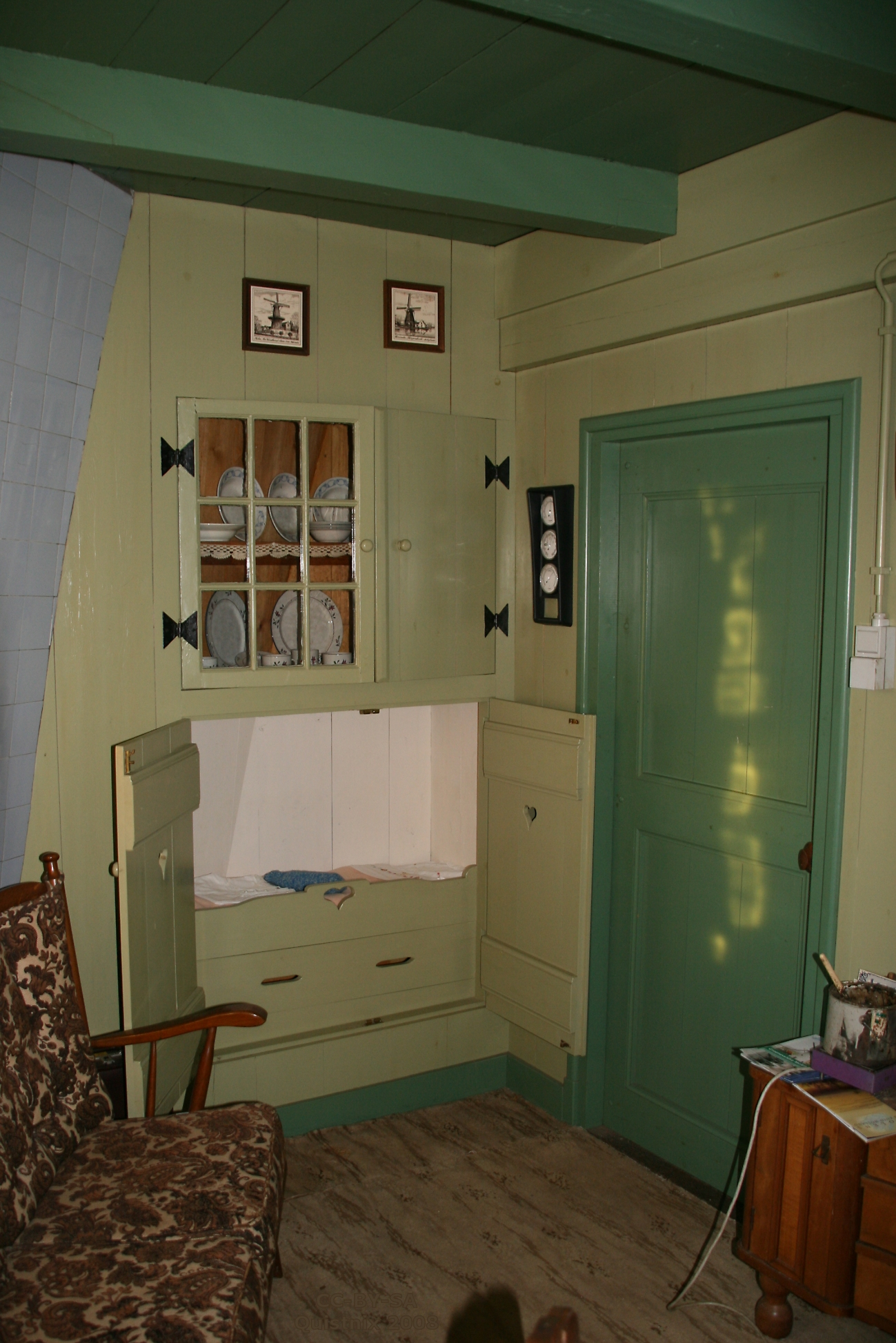 Schipluiden: Groeneveldse Molen, molenaarswoning. Bedstede voor baby of peuter